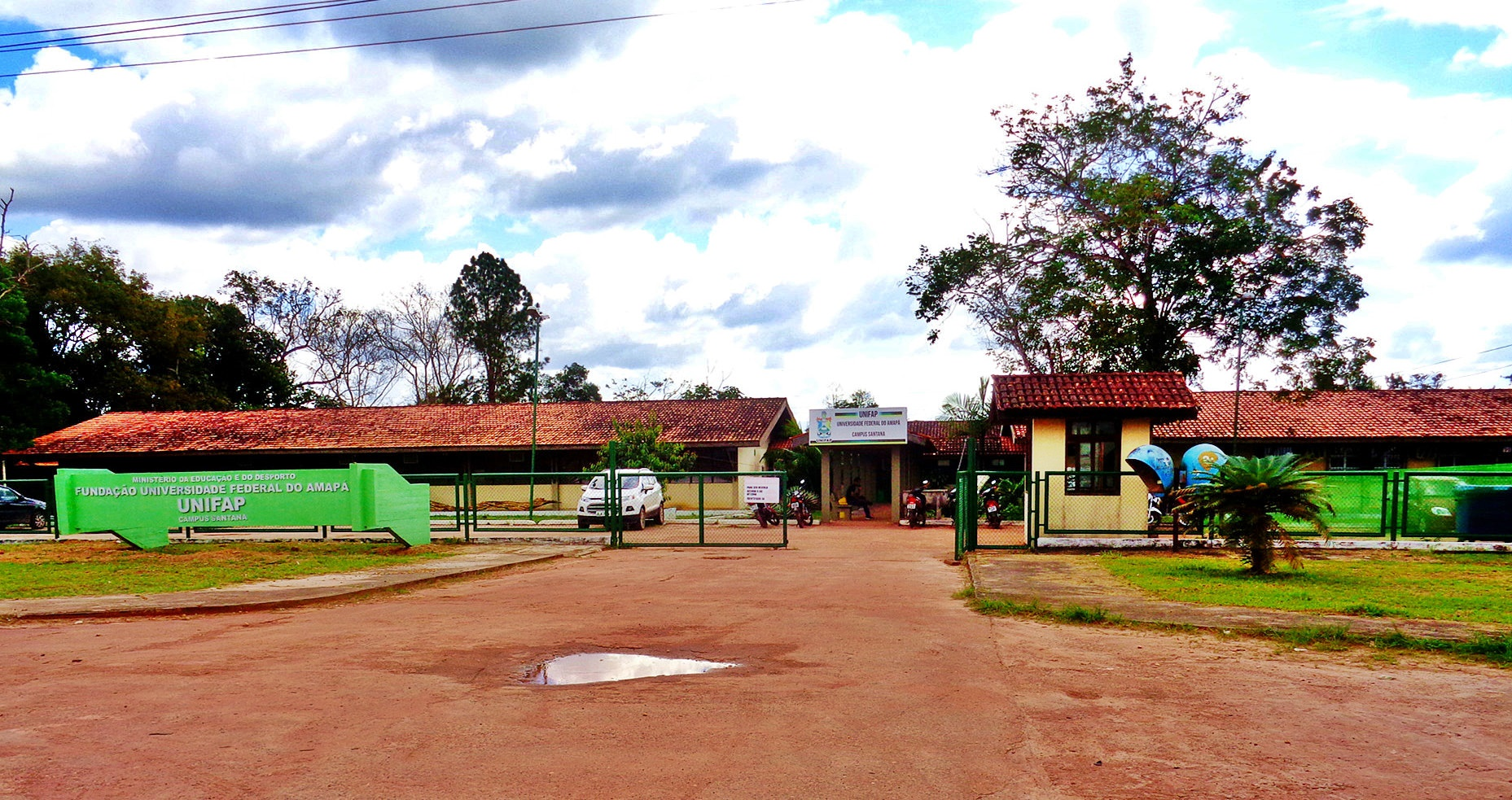 Fachada do Campus Santana